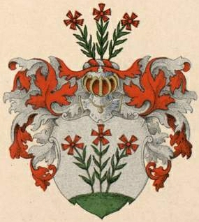 Nolckeni suguvõsa aadli- ja parunivapp